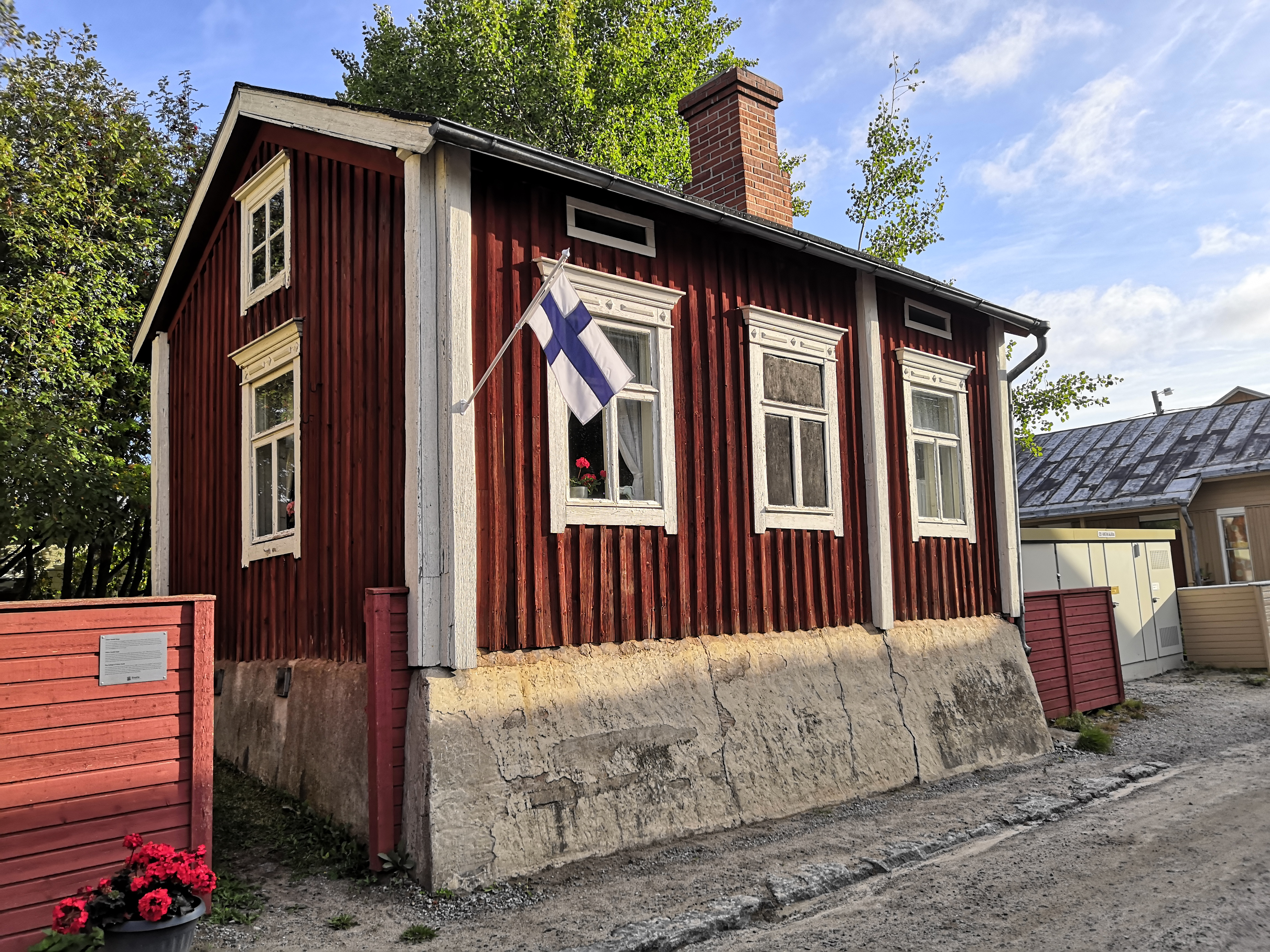 Viktor Karl Sund (27. elokuuta 1891 Pietarsaari – 27. heinäkuuta 1966 Pietarsaari) oli suomalainen opettaja, keräilijä ja ruotsin kielellä kirjoittanut runoilija. Sundin koti Taljasepänkatu 8:ssa Skatassa on kunnostettu, ja talo on vuokrattavissa yksityistilaisuuksiin.